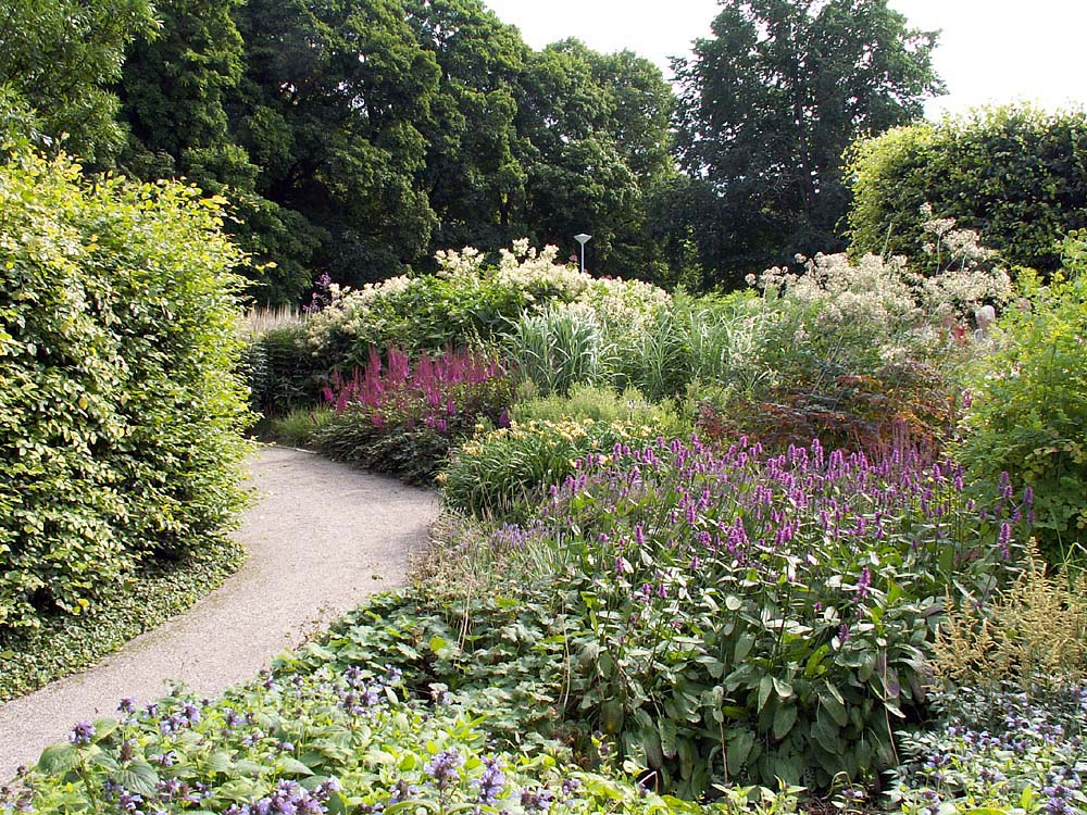 Foto: Gustaf Eriksson Datum: 10 augusti 2005 Beskrivning: En perennrabatt i Enköping